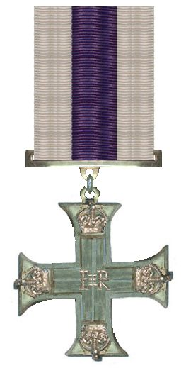 Het Military Cross, Uitgave Elizabeth II